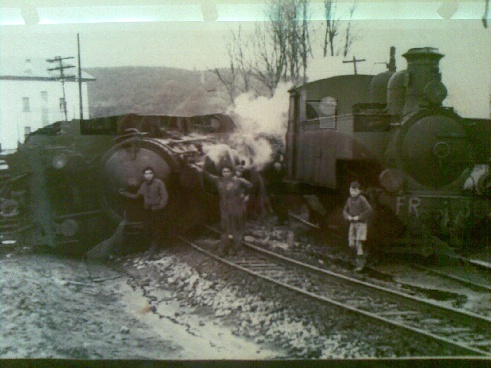 Una locomotora descarrilada en las inmediaciones de la estación de tren de Guardo, Palencia (España)